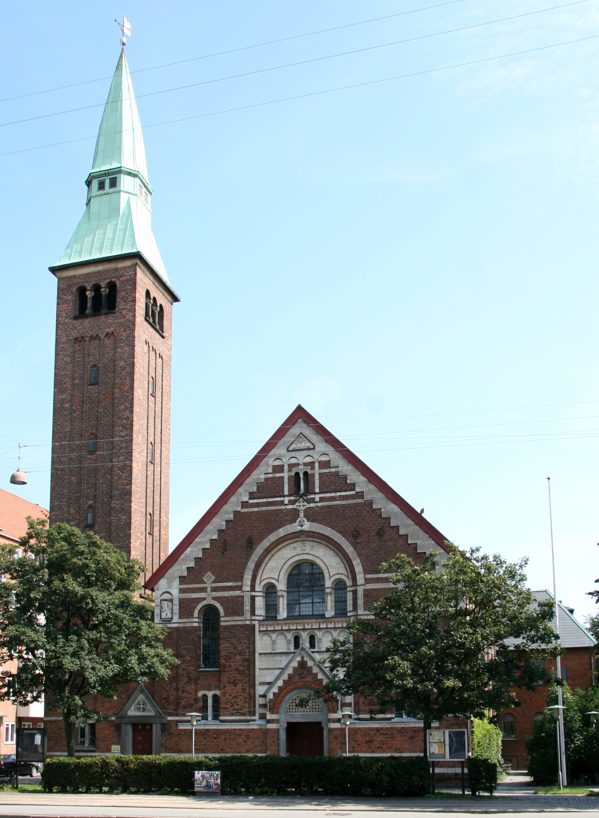 Sions Kirke in Copenhagen, Denmark.